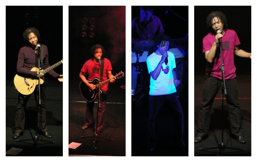 Teatro Caupolican, Santiago de Chile Domingo 18 de Mayo